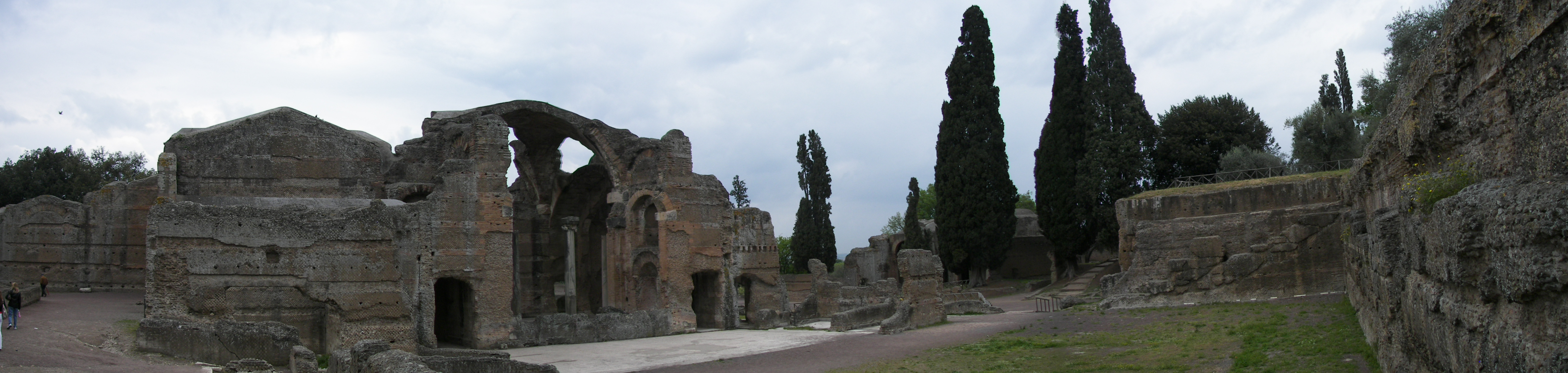 Grandi terme in Villa Adriana, Tivoli.